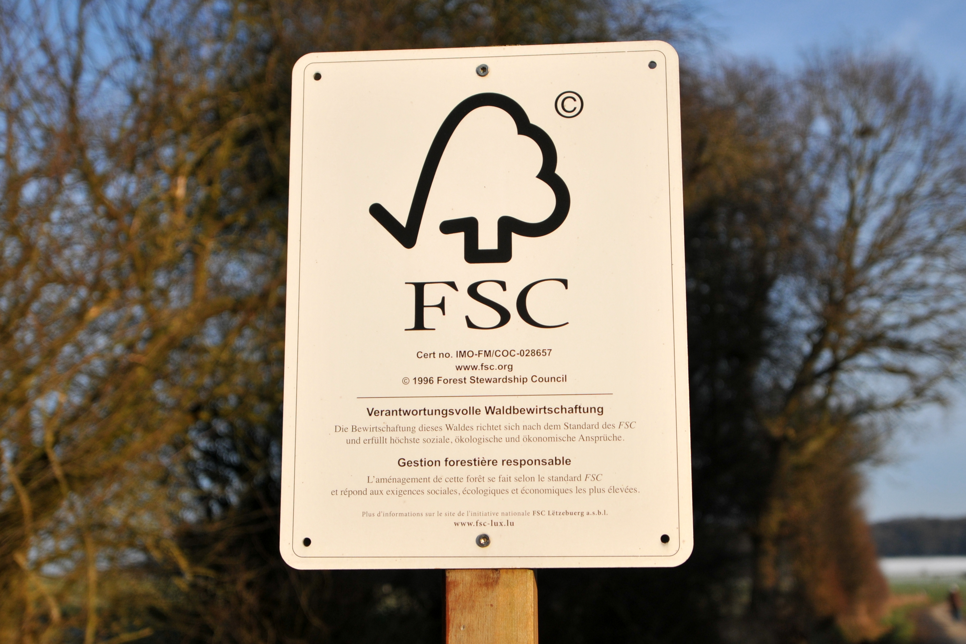 FSC-Schëld zu Réiser.